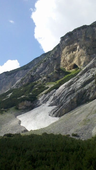 Roßloch Höhle Nordwand